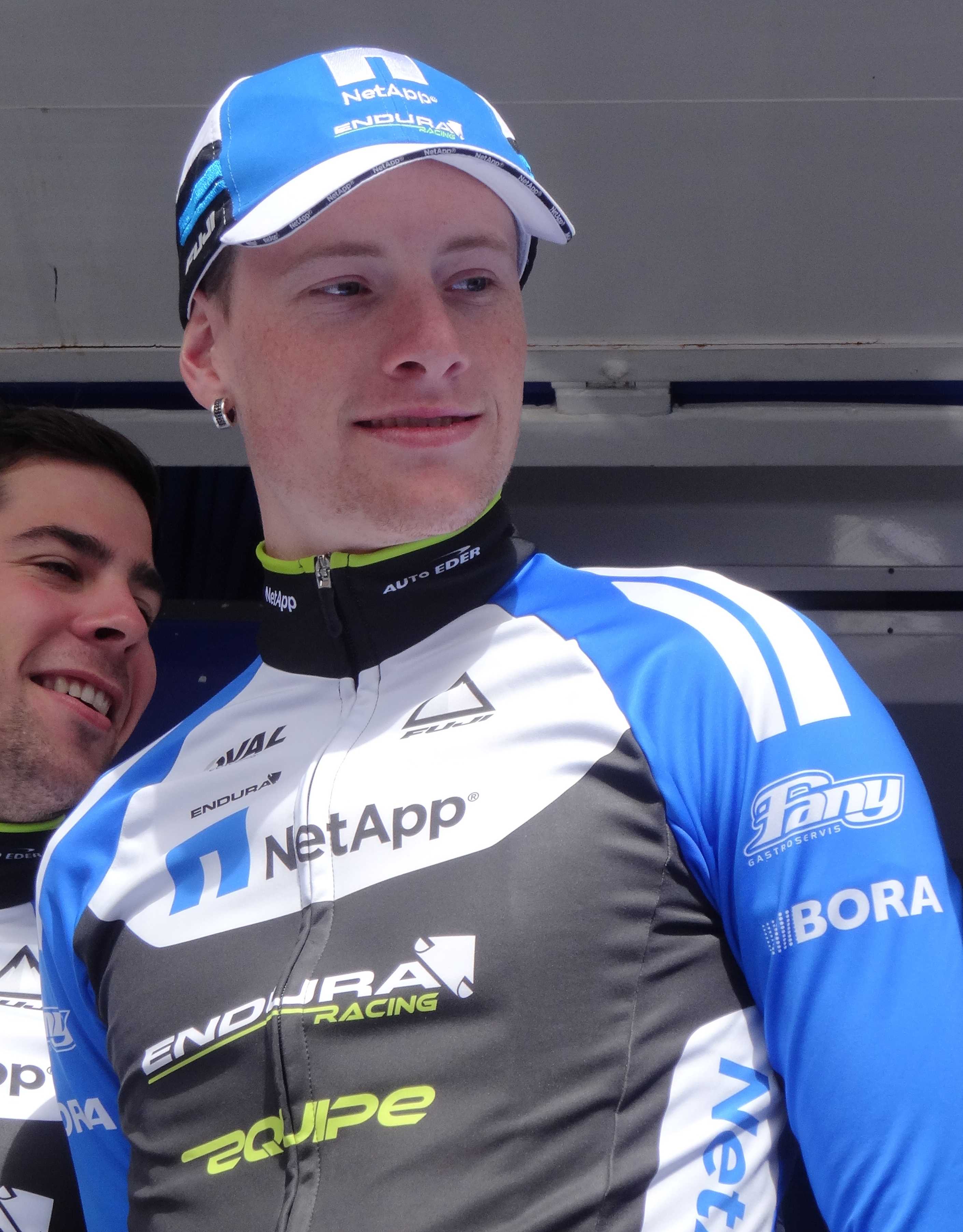 Reportage photographique réalisé le mercredi 7 mai 2014 au départ de la première étape de l'édition 2014 des Quatre jours de Dunkerque à Dunkerque, Nord, Nord-Pas-de-Calais, France. Depicted person: Sam Bennett Depicted team: NetApp-Endura